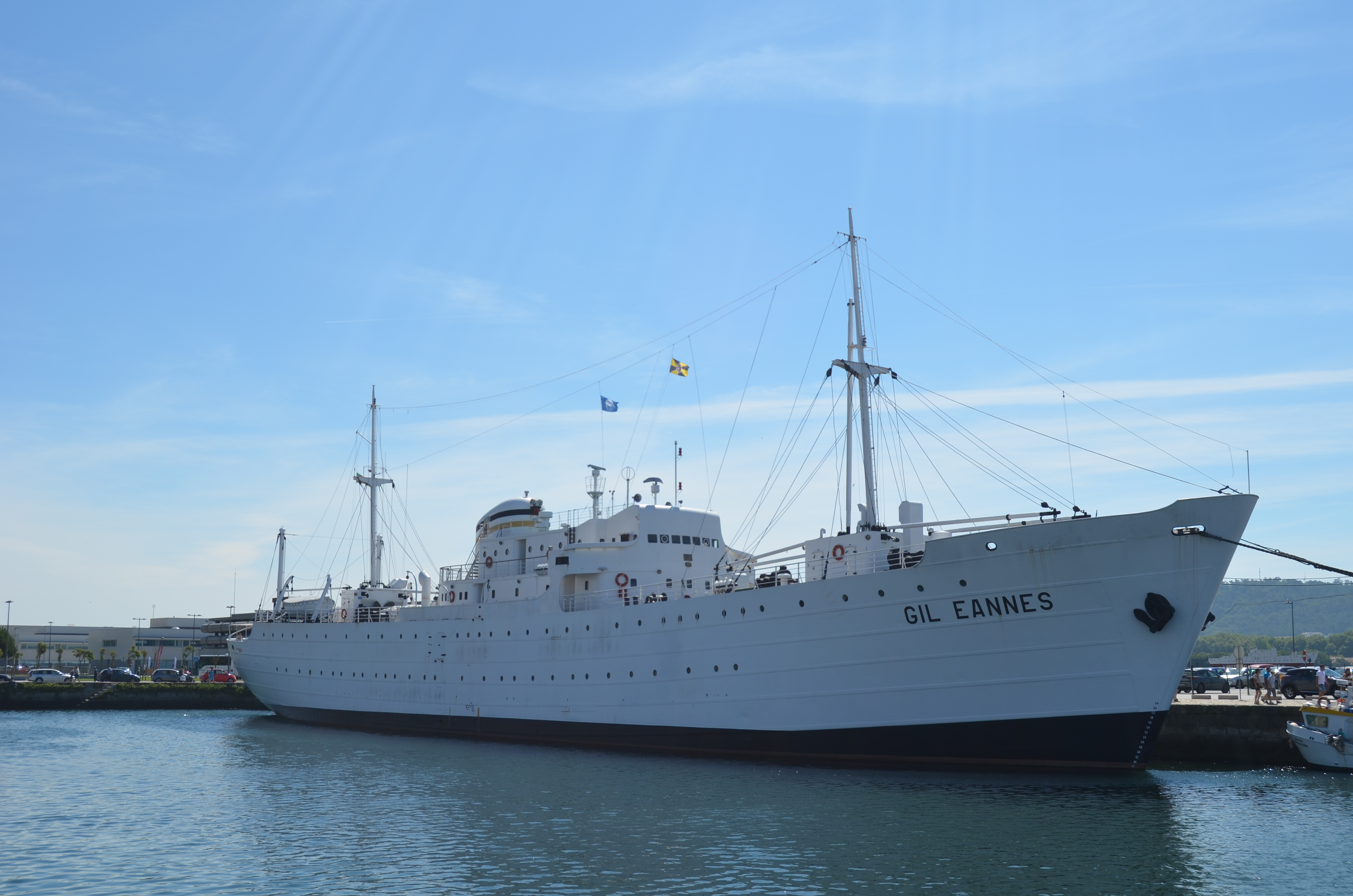 Gil Eanes